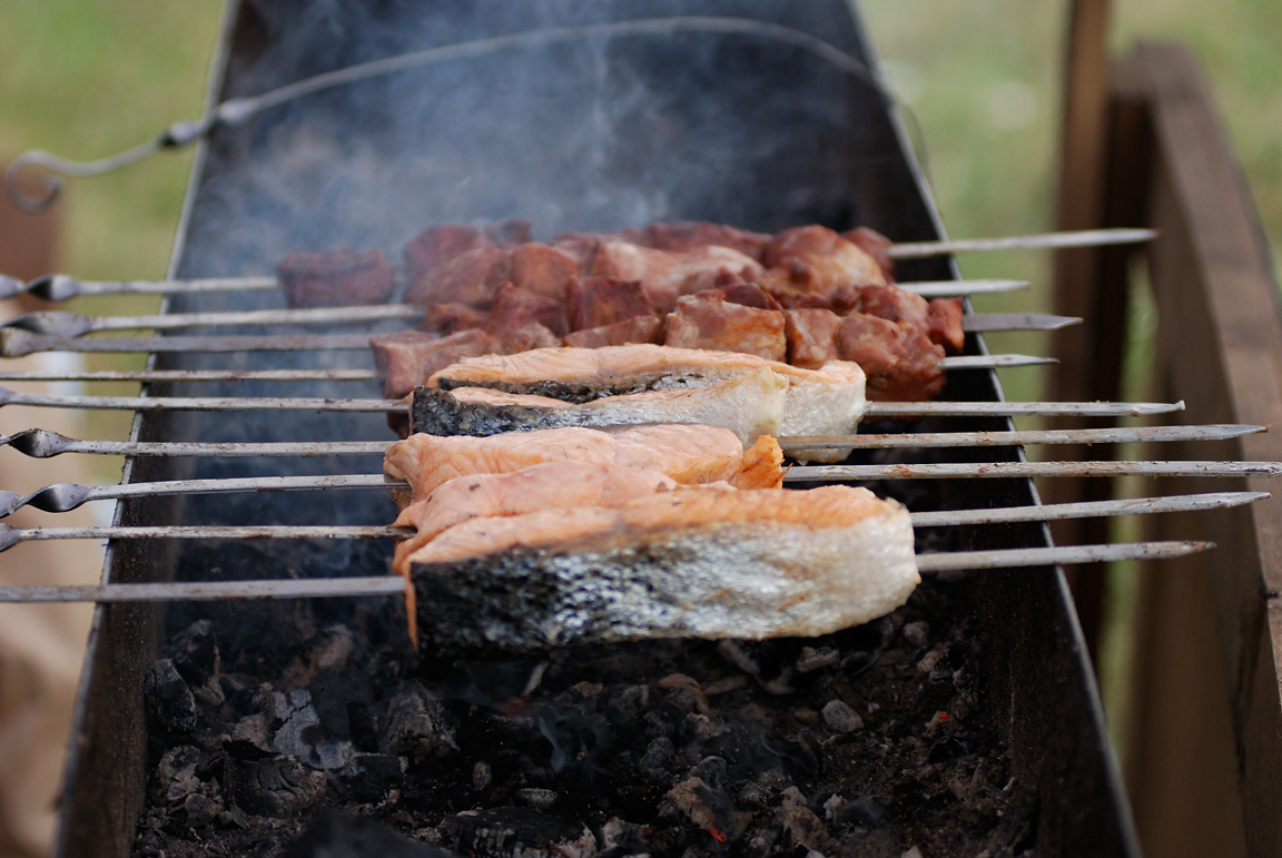 Rybí šašliky